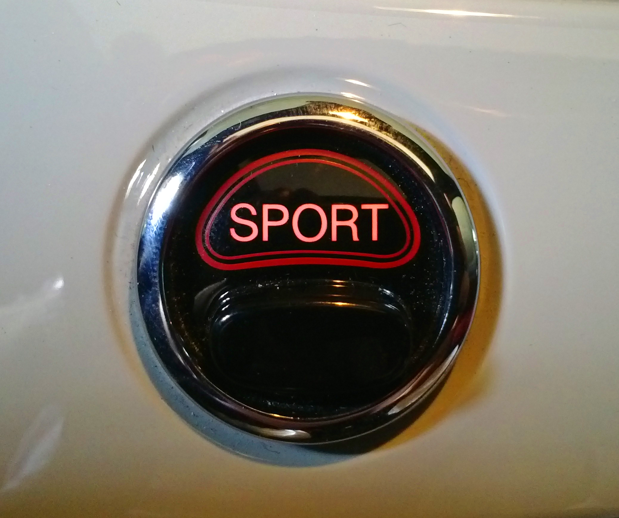 Pulsante Sport Abarth 500